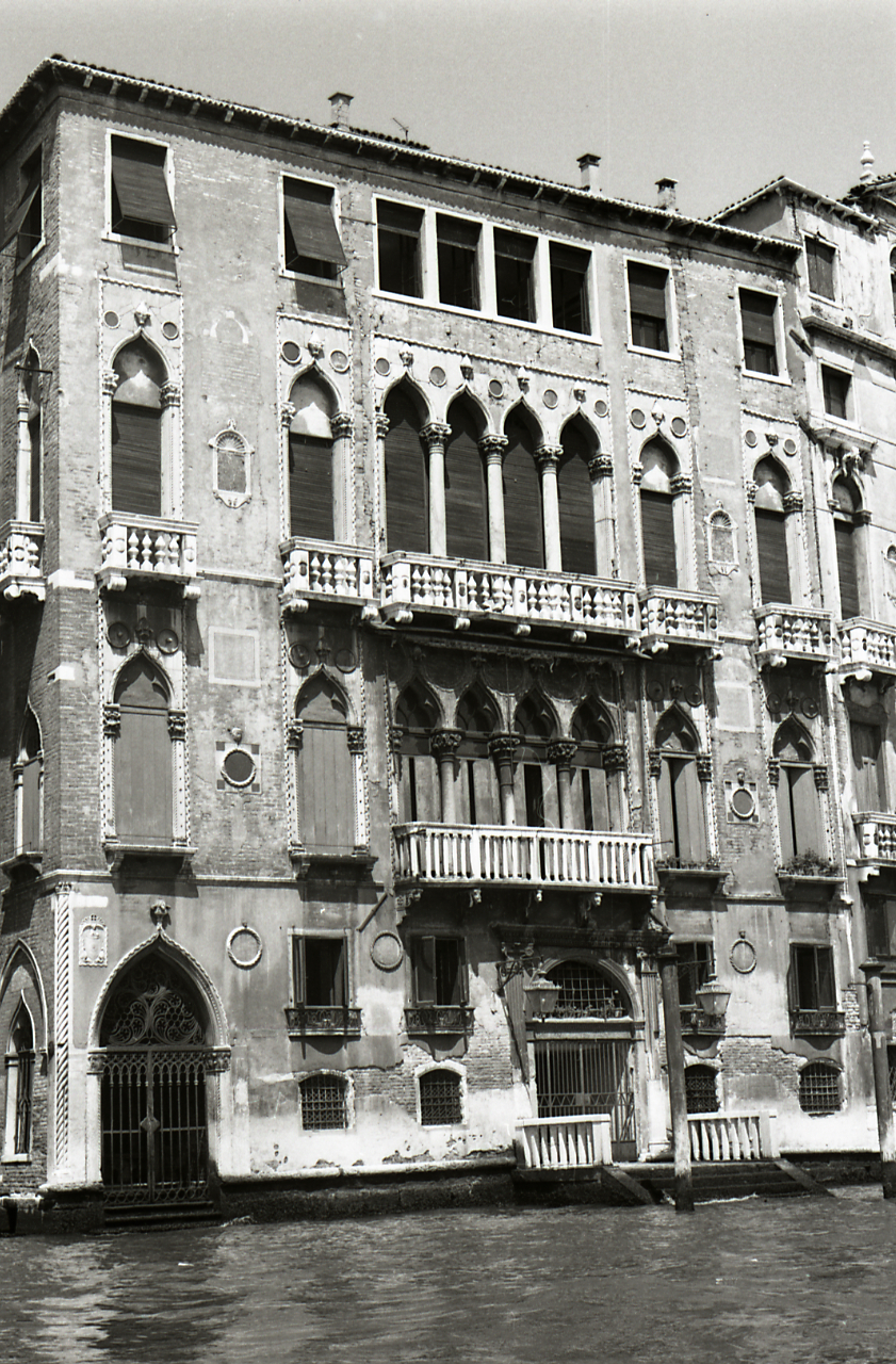 Serie fotografica : Venezia, 1969 / Paolo Monti. - Strisce: 6, Fotogrammi complessivi: 34 : Negativo b/n, gelatina bromuro d'argento/ pellicola ; 35 mm. - ((I fotogrammi hanno una doppia numerazione. . - Sul portanegativi: Nikon FP4. - All'interno del portanegativi Monti specifica alcuni soggetti. - Fonte: Agenda di Paolo Monti: Monti - Agenda 1969 (1969), presso Archivio Paolo Monti